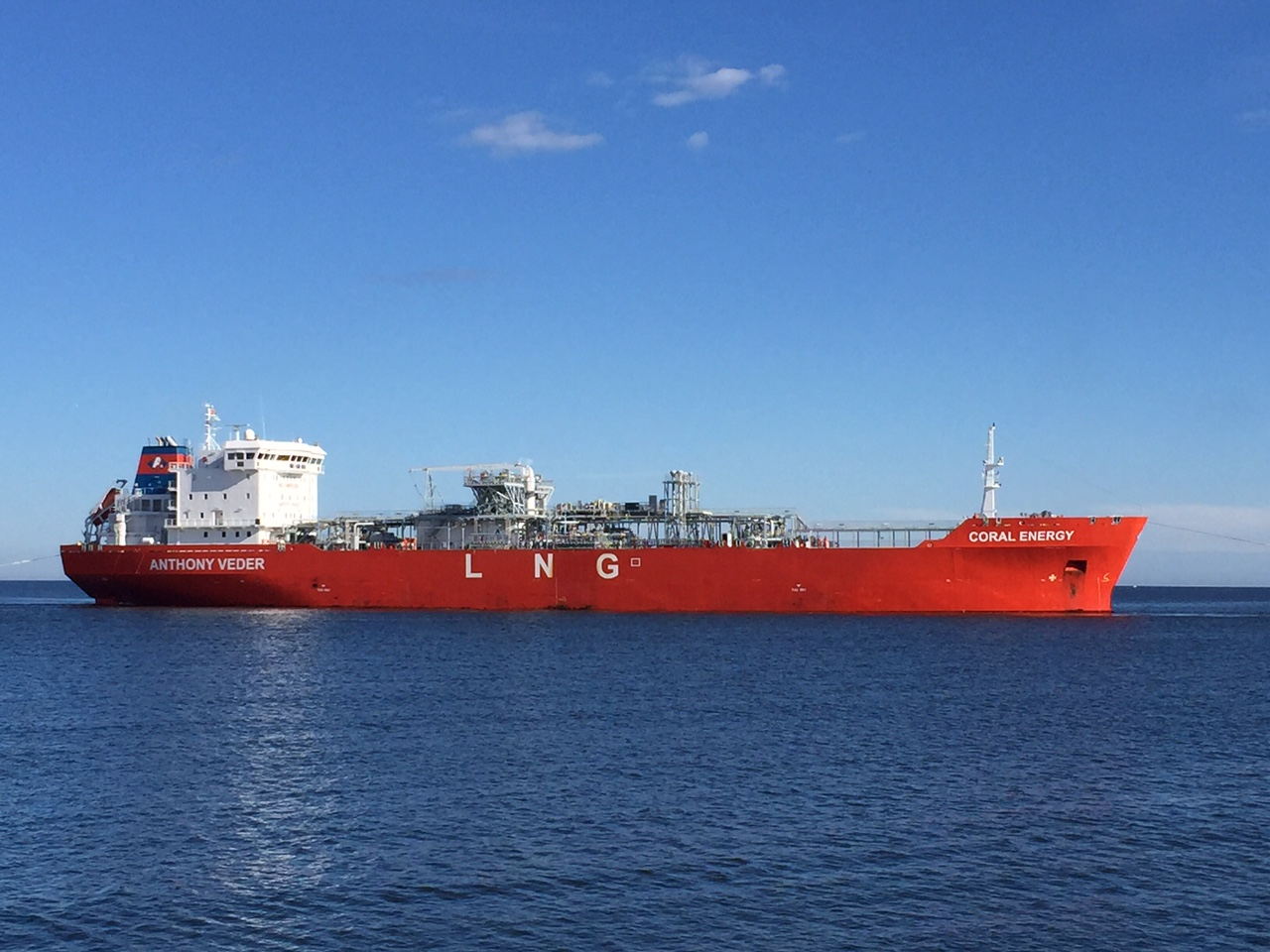 Nesteytettyä maakaasua (LNG) toimitetaan LNG-laivalla Gasumin tytäryhtiön Skangasin LNG-tuontiterminaaleihin Suomessa ja Ruotsissa.